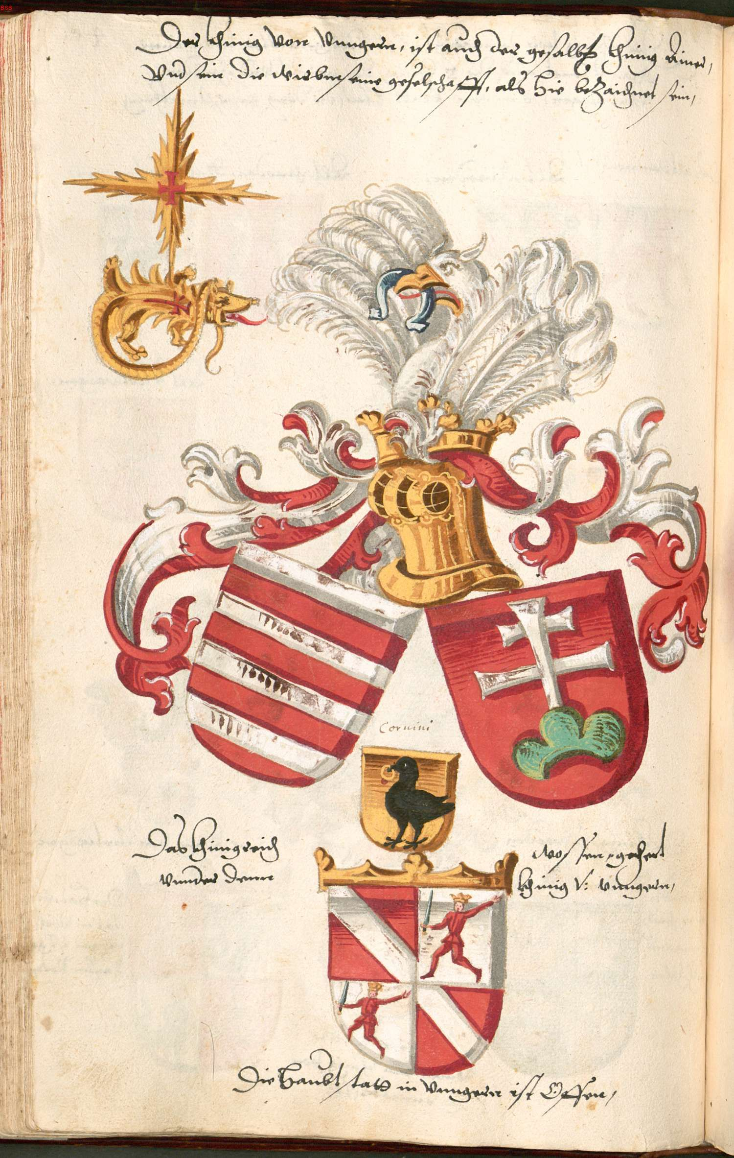 A Magyar Királyság címerpajzsai, az Anjou - csőrében patkót tartó - strucc sisakdísze, a Sárkányrend színezett jelvénye, Corvin Mátyás hollós szívpajzsa Conrad Grünenberg címerkönyvéből, 1602 - 1604 Bayerische Staatsbibliothek Grünenberg, Konrad: Wappenbuch - BSB Cgm 9210, [S.l.] Bayern, 1602 - 1604 [BSB-Hss Cgm 9210]